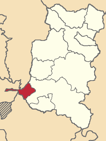 Mapa localizacor del cantón en Chimborazo, Ecuador